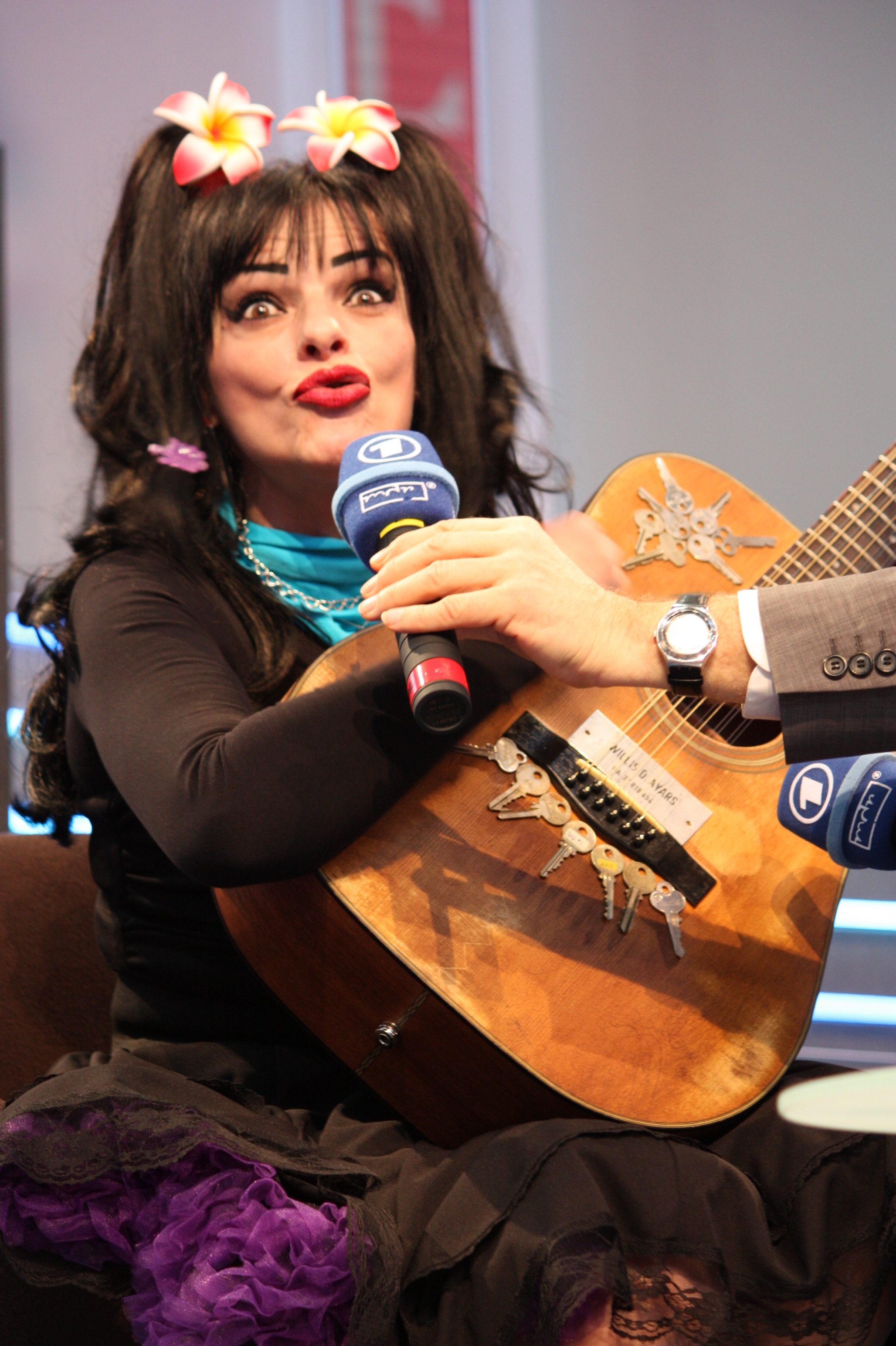 Nina Hagen auf der Leipziger Buchmesse im März 2010